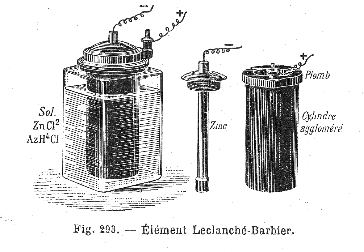 Illustration d'un élément de pile Leclanché